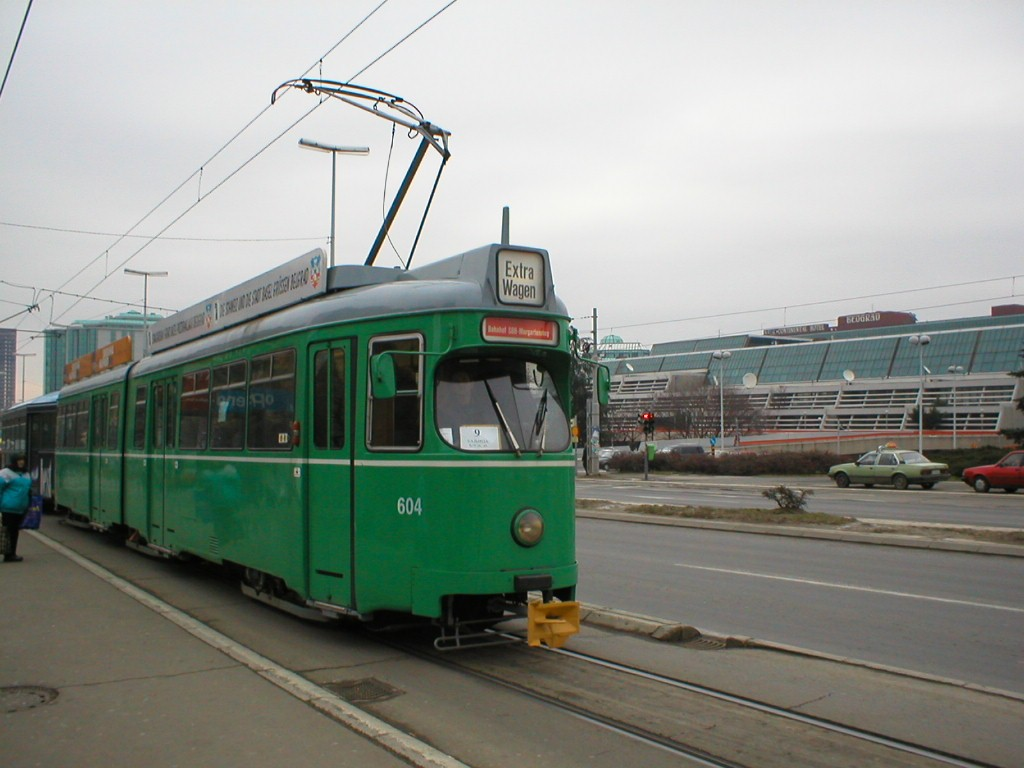 Tram in Belgrade